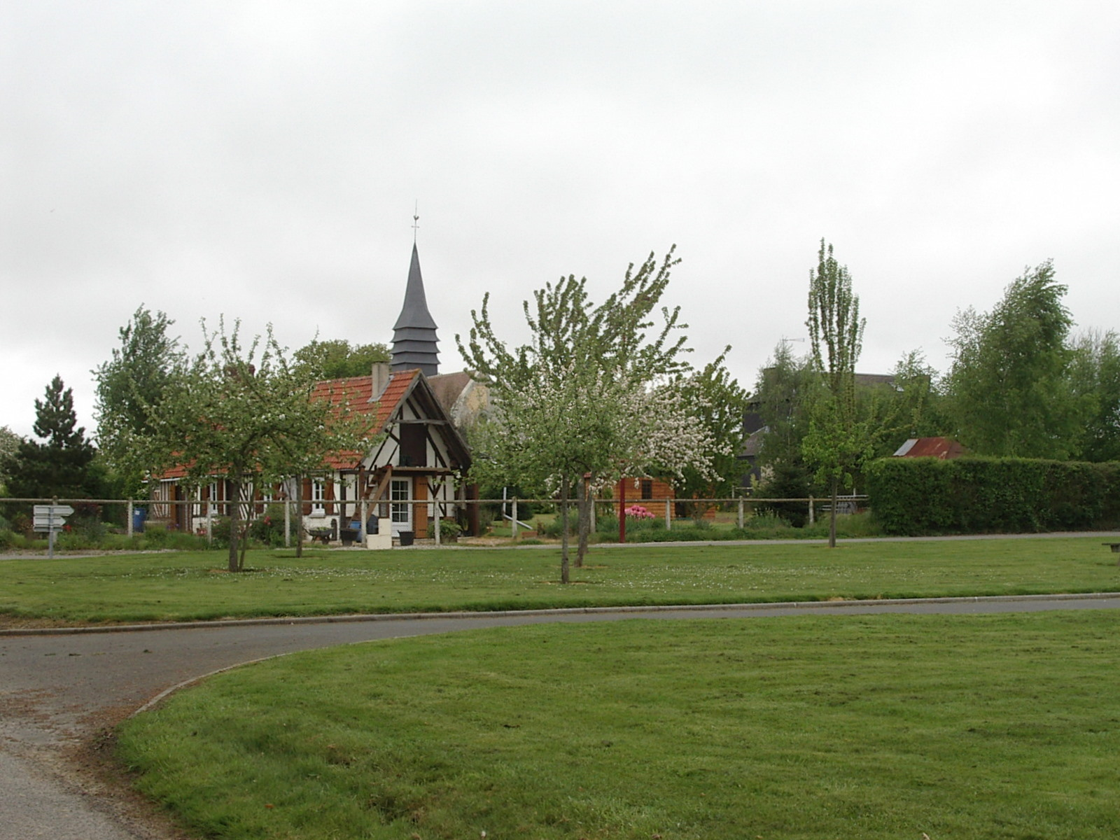 Vue du village de Sainte-Marguerite-en-Ouche (France, Eure)